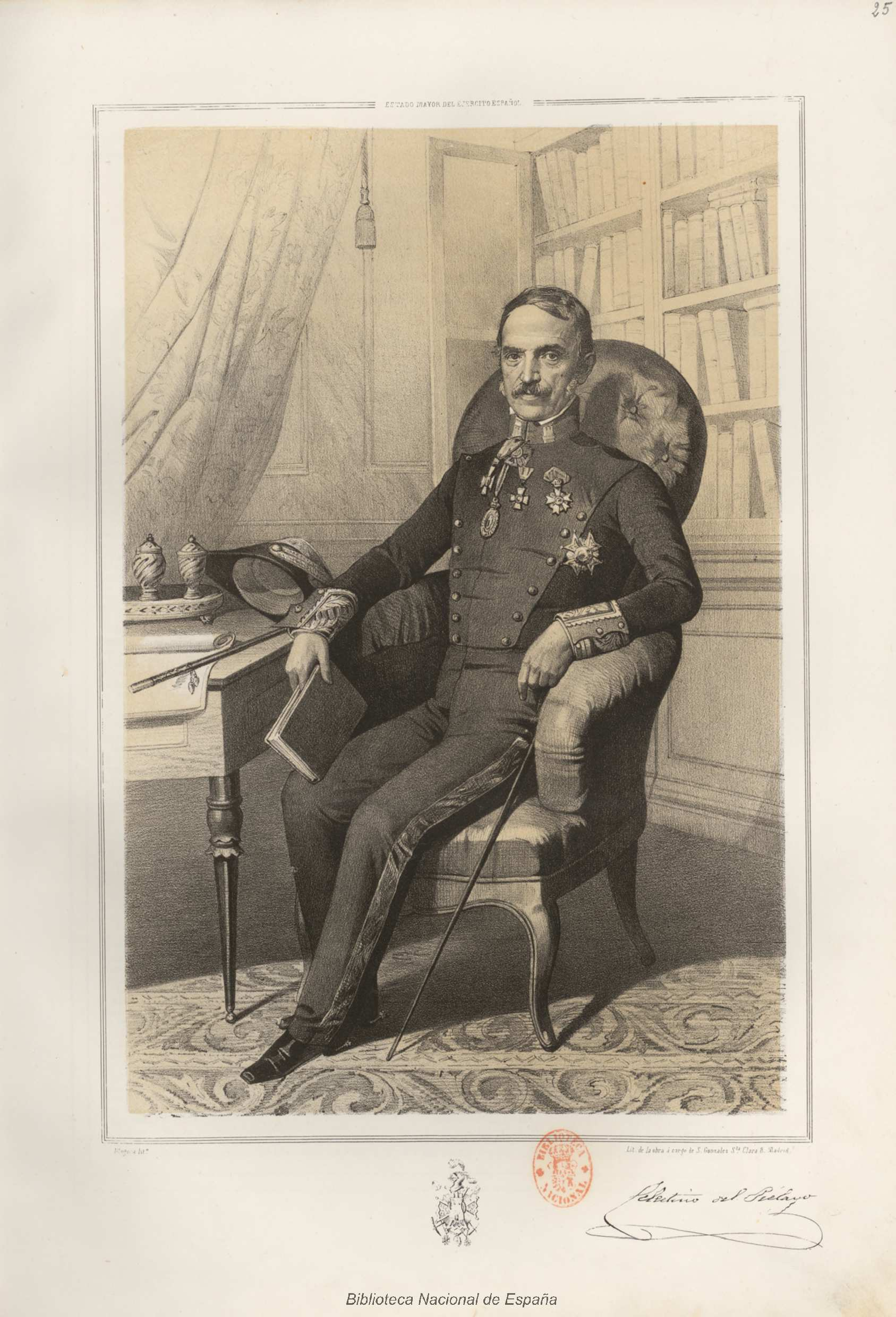 Celestino del Piélago. Dibujo de Carlos Múgica y Pérez para "Estado Mayor General del Ejército